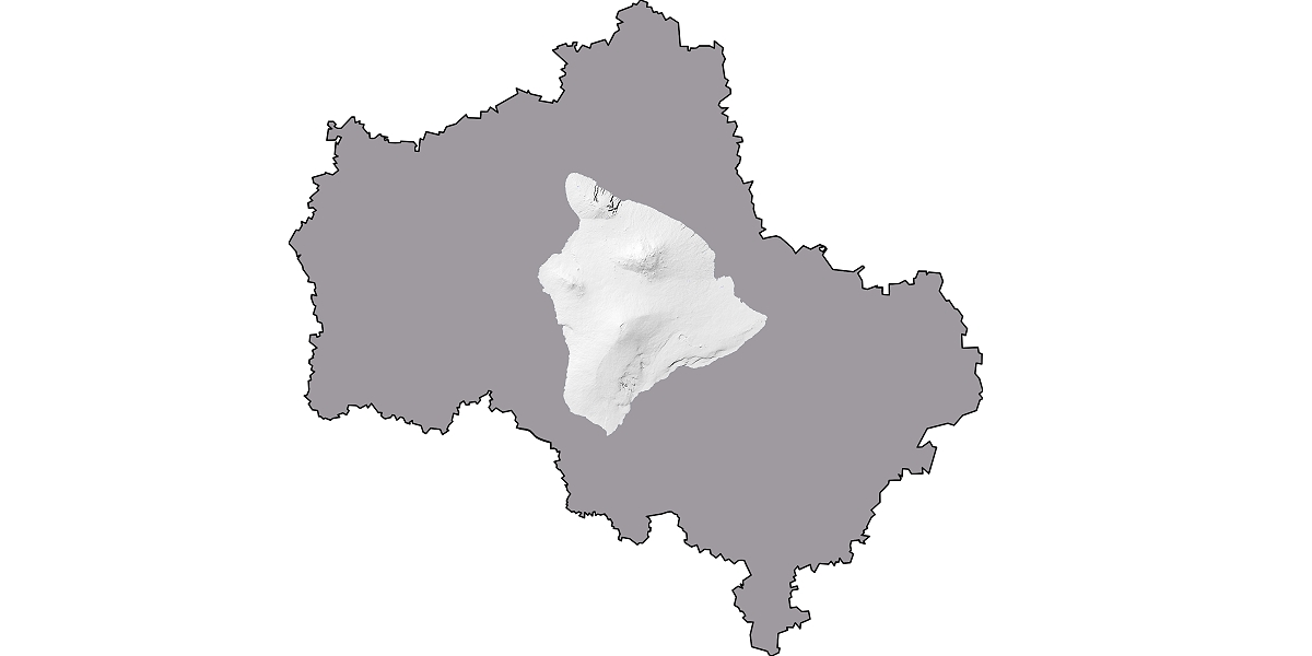 Сравнение размеров Московской области с островом Гавайи. Иллюcтрация для викиучебника Гавайеведение